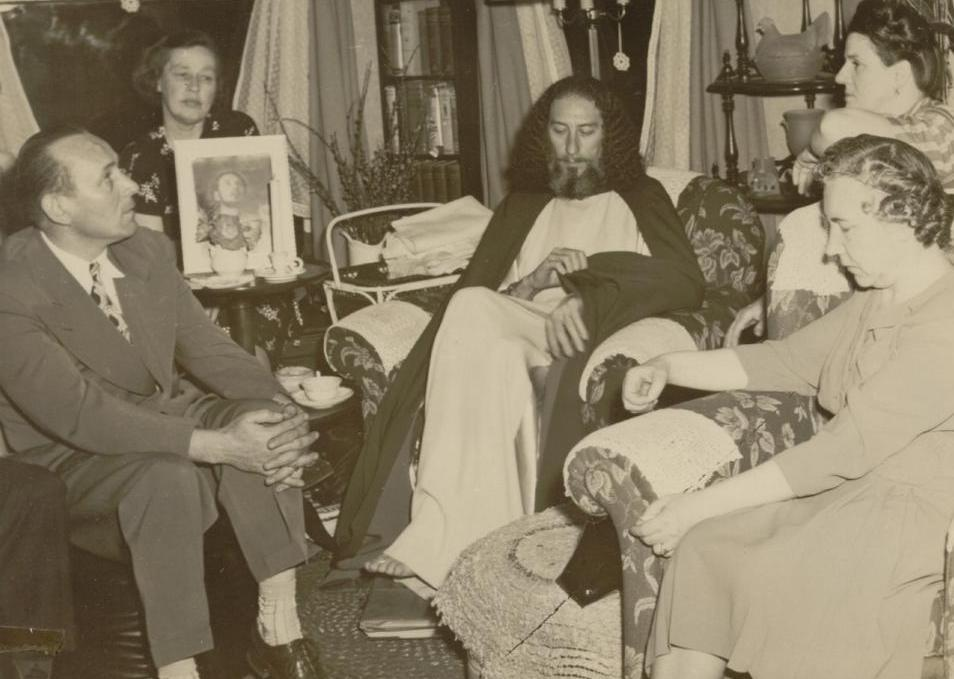 1949 Worcester Meeting, Rudi Balzer, Elsa Lackstrom, MKV, x, Signe Holme